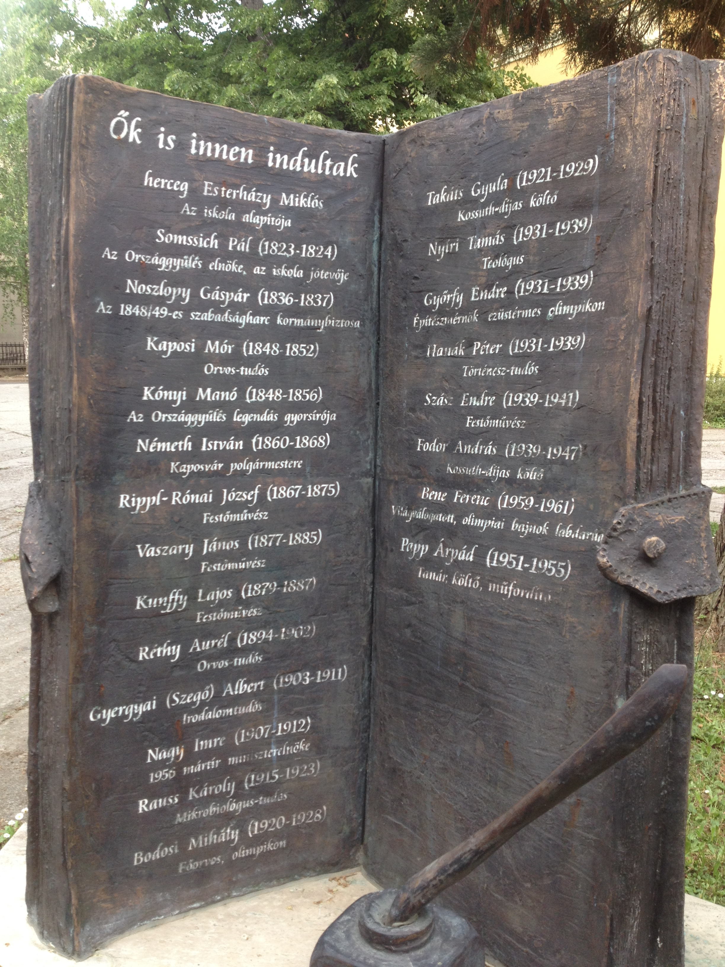 Díszkönyv (Szabó Éva és Sörös Rita alkotása, 2010, anyaga bronz), Kaposvár, Bajcsy-Zsilinszky utca 17. (Táncsics Mihály Gimnázium)